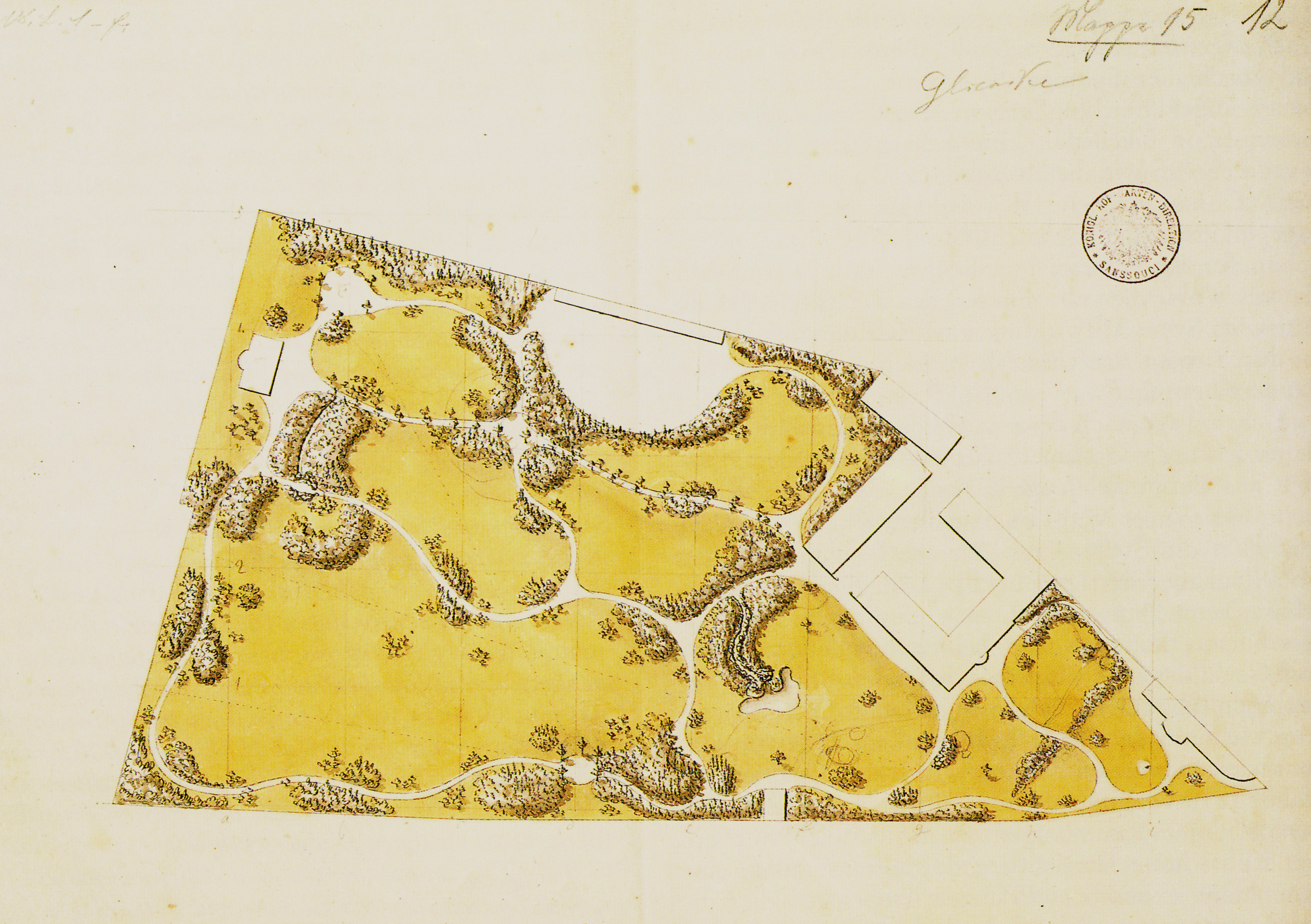 Entwurfsplan des Pleasuregrounds Klein-Glienicke